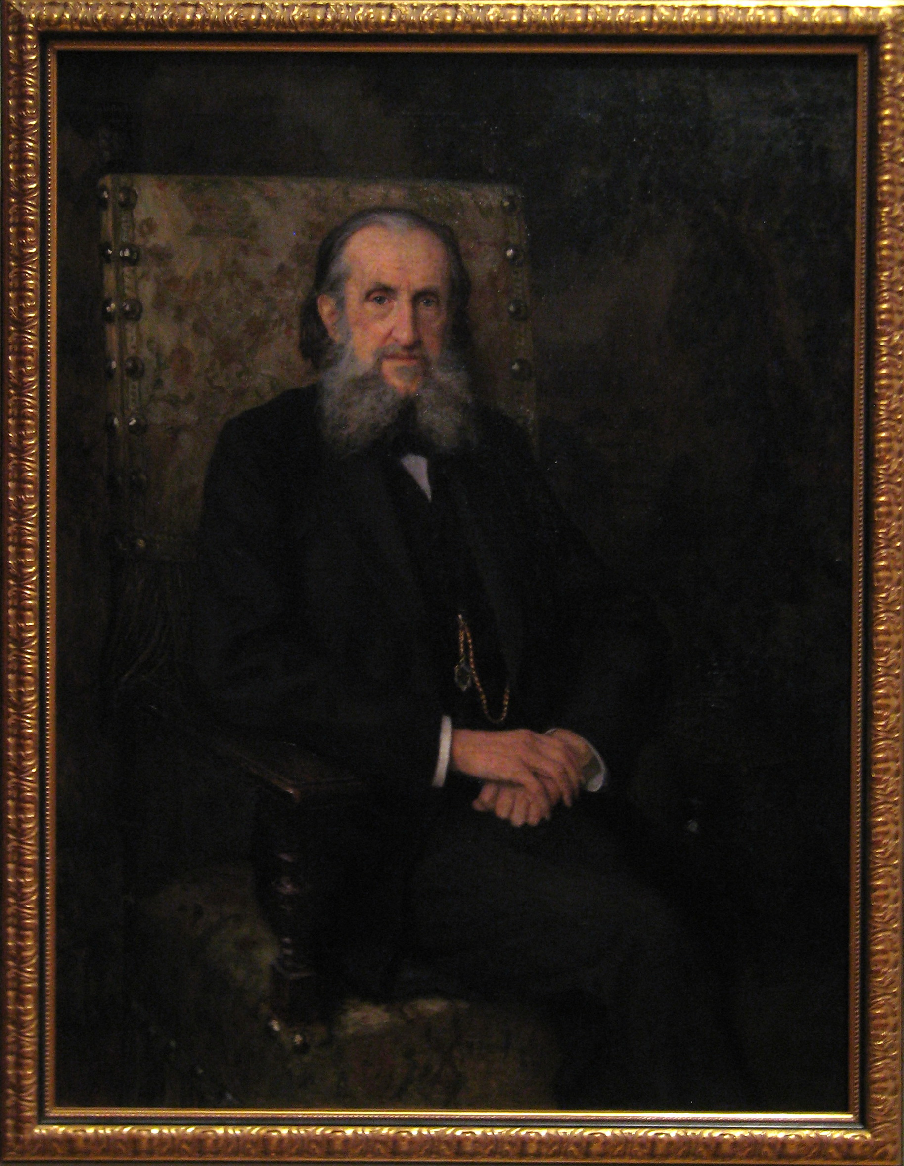 В. Герье. Портрет кисти Н. Богданова-Бельского. 1890-е. ГИМ